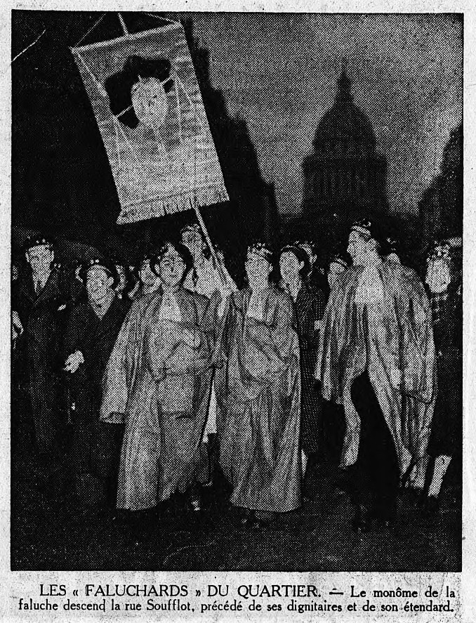 Le monôme de la faluche descend la rue Soufflot.